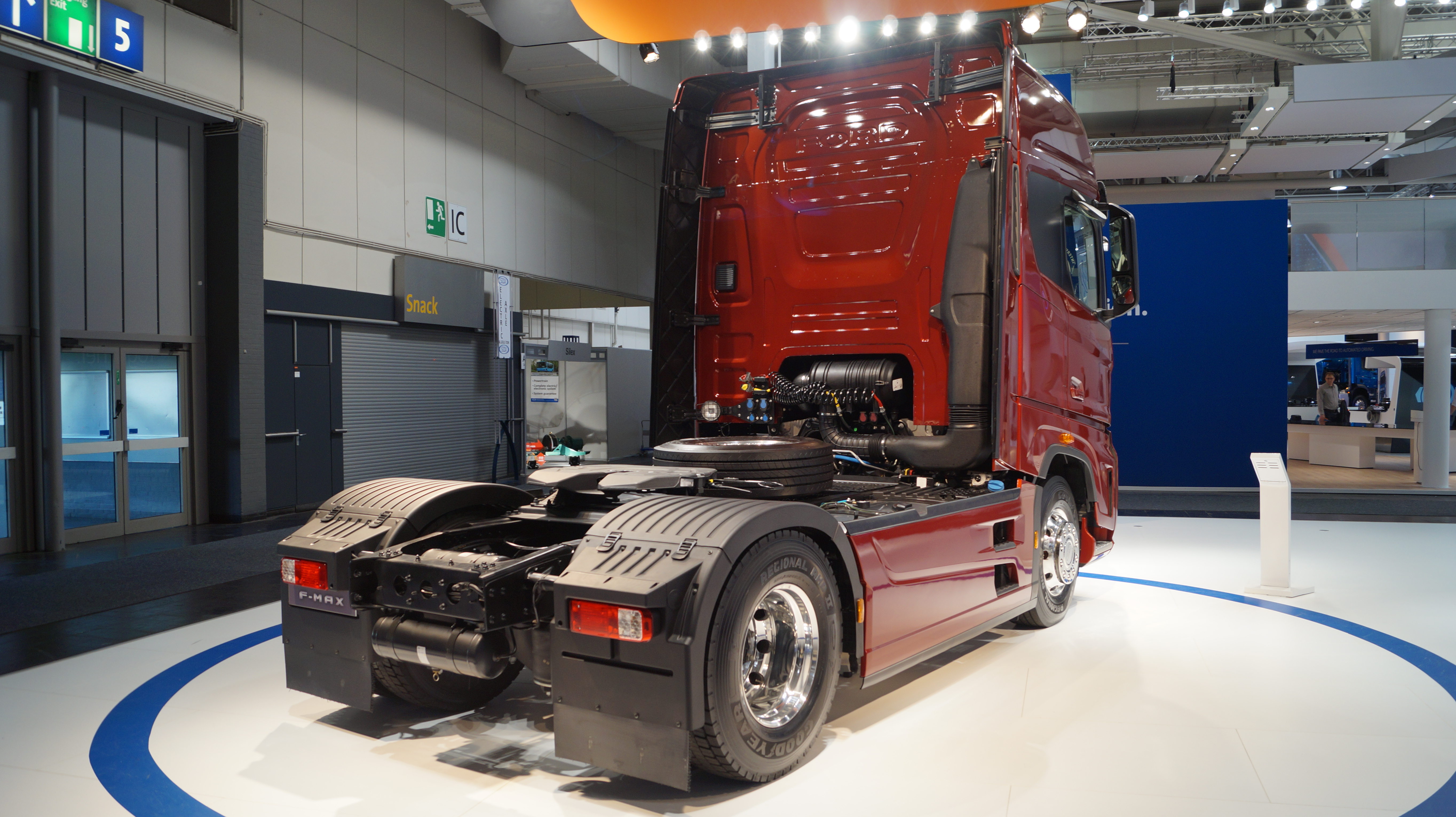 Schrägansicht des Hecks eines Ford F-MAX in der Metalliclackierung Red Rush, ausgestellt auf der IAA 2018.